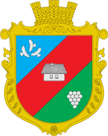 Герб села Каракурт